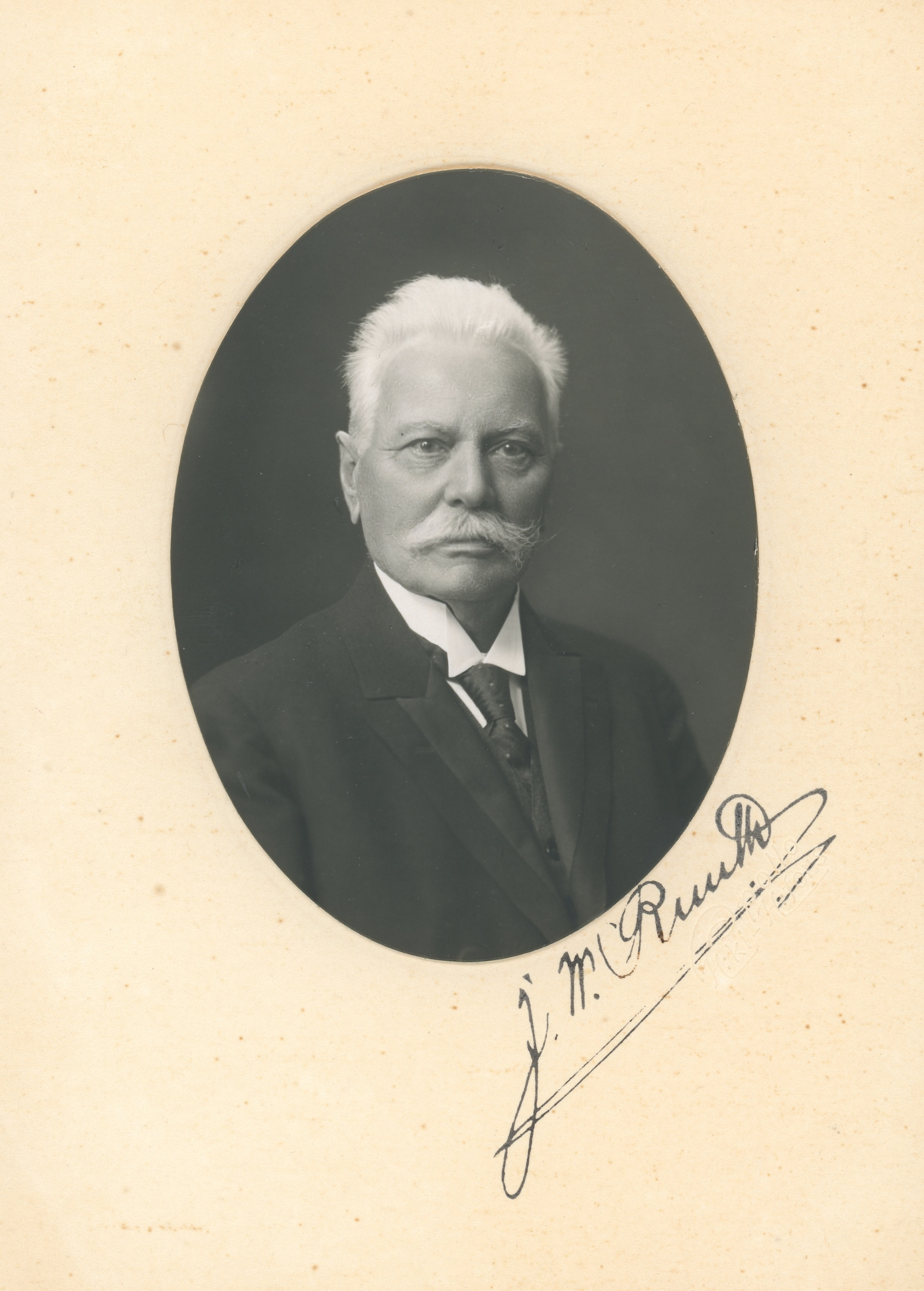 Johan Wilhelm Ruuth 1854-1928.